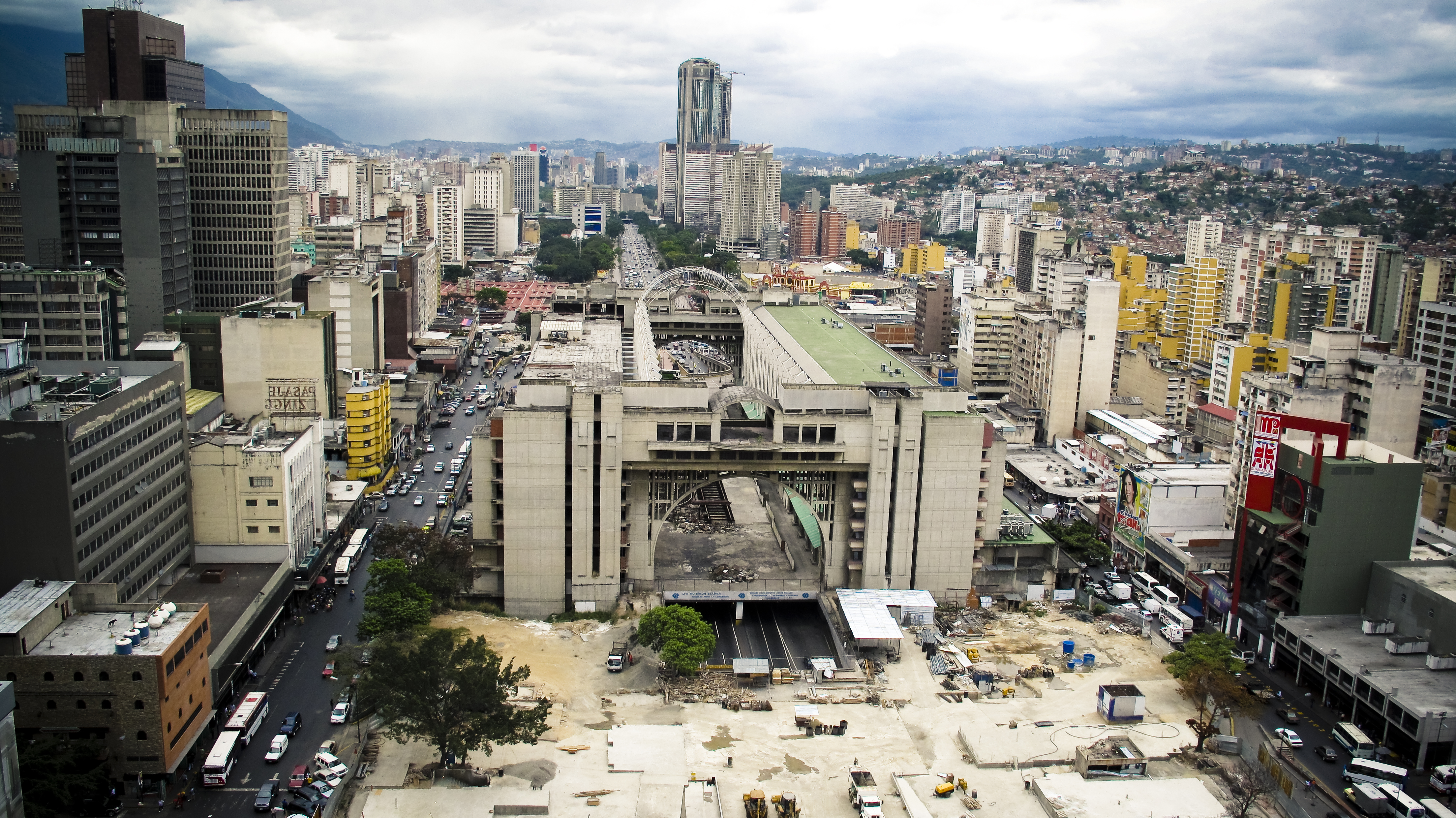 Caracas Centro Simón Bolívar vitra de trabajos en la Plaza Diego Ibarra